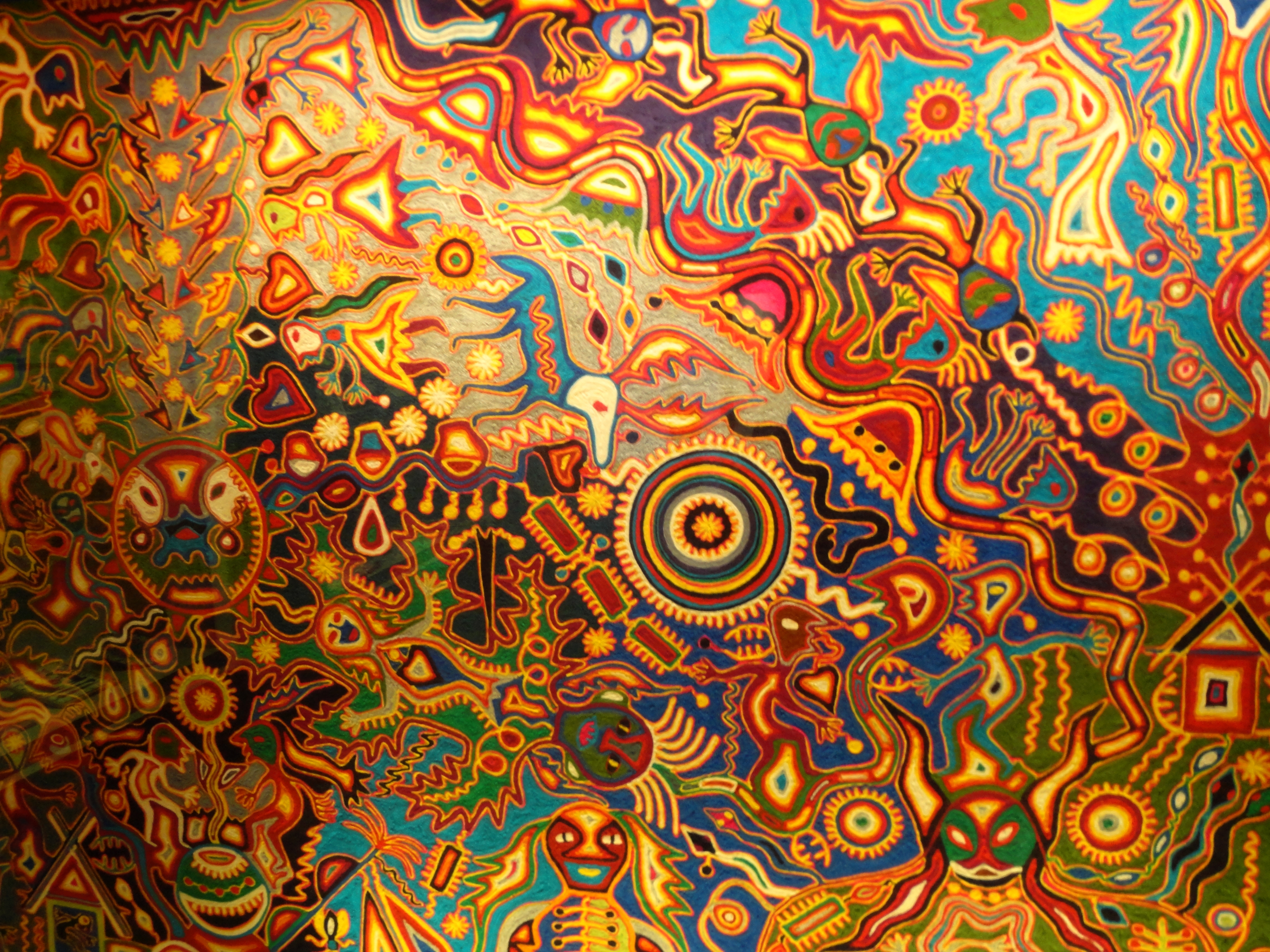 La visión de "Tatutsi Xuweri Timaiweme" - Arte del pueblo wixárika (huichol)